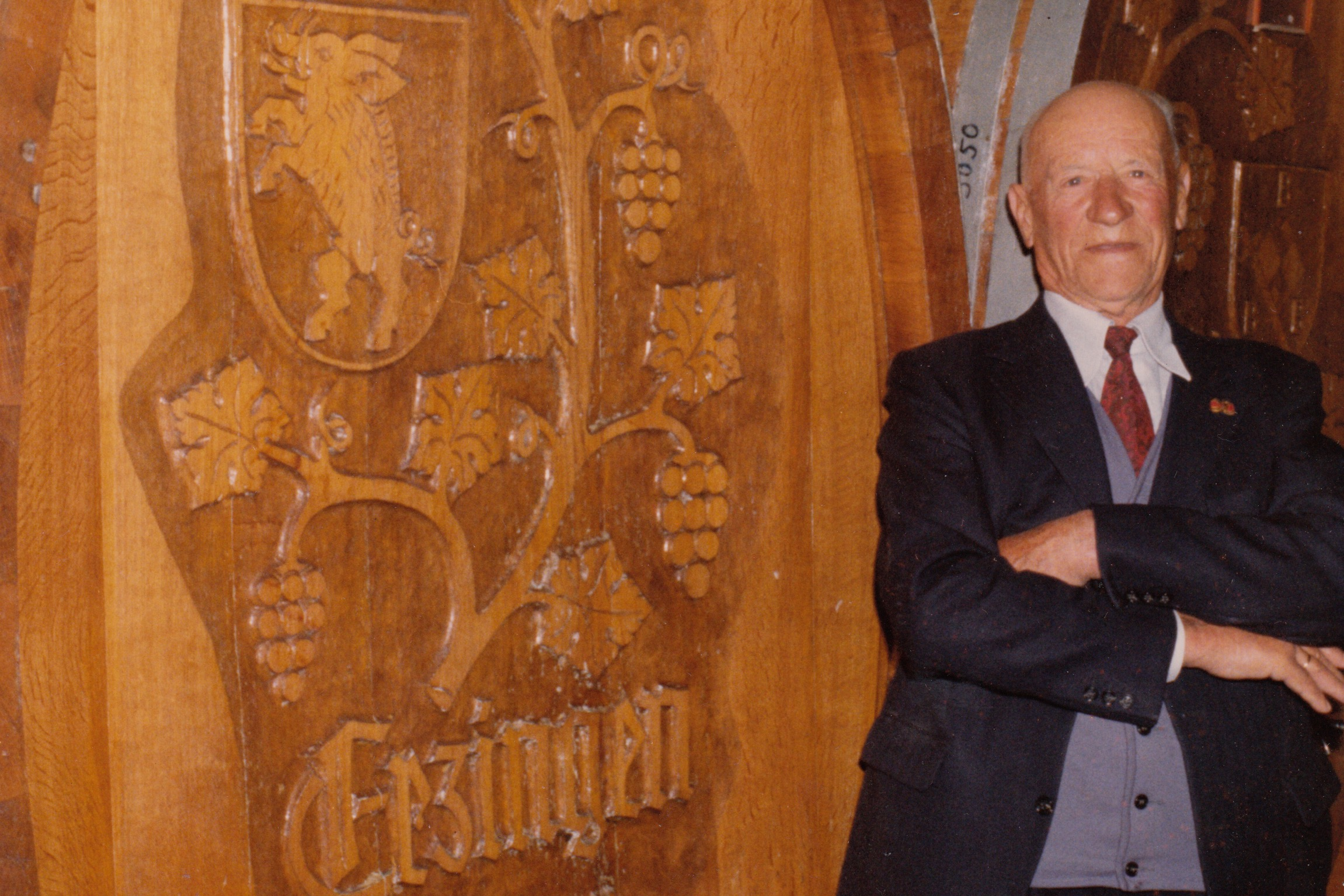 Heinrich Winter war Winzer ("Rebenvater"), erster Nachkriegsbürgermeister, Begründer der Winzerfeste und Erneuerer des Weinbaus in Erzingen (Klettgau) im Landkreis Waldshut in Baden-Württemberg.